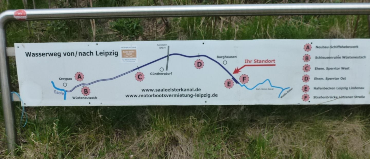 Informationstafel zum Elster-Saale-Kanal am östlichen Kanalende